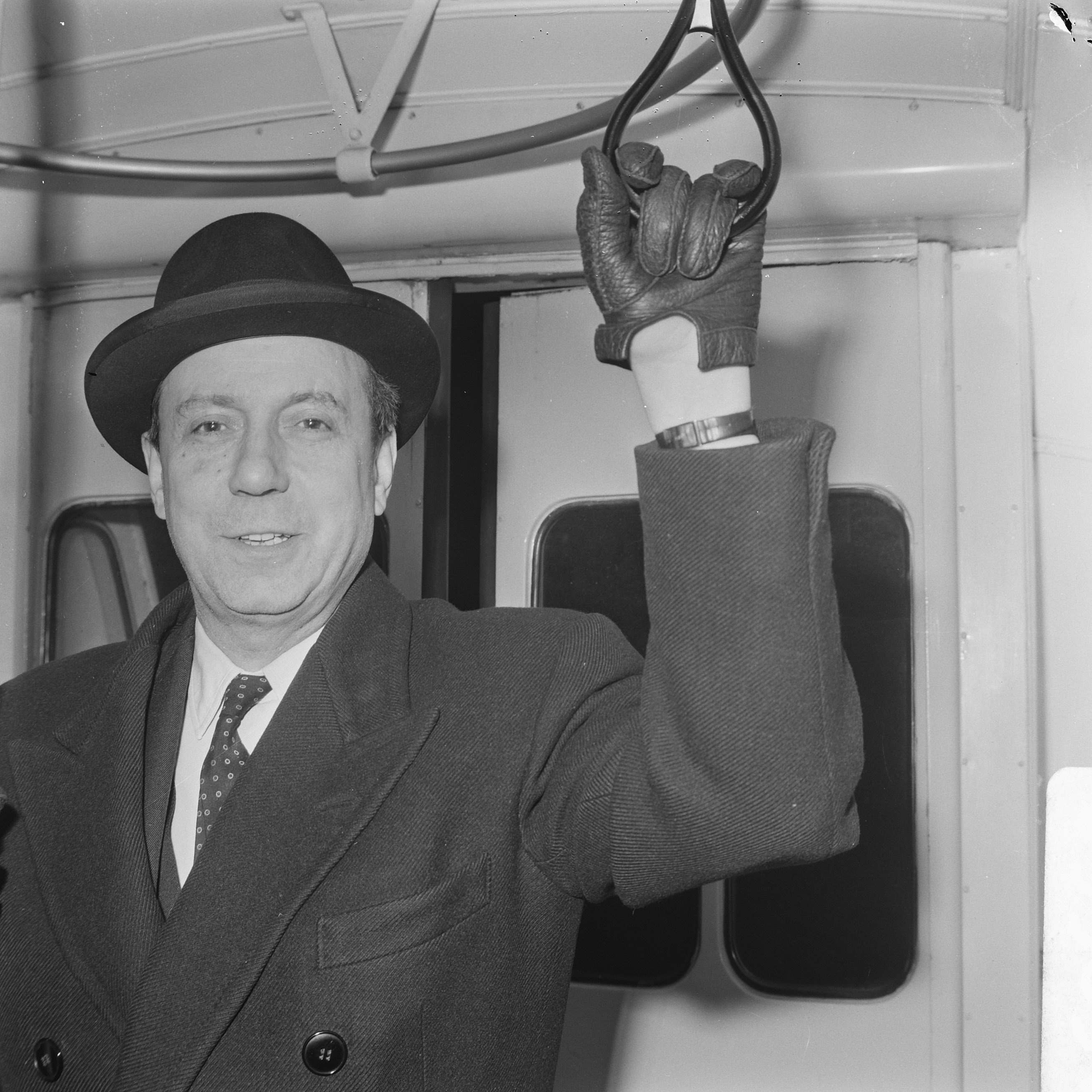 Collectie / Archief : Fotocollectie Anefo Reportage / Serie : [ onbekend ] Beschrijving : Opdracht NTS, aankomst Franse Minister Michel Debre (kop) Datum : 15 januari 1967 Trefwoorden : aankomsten, ministers Persoonsnaam : Debre Michel Instellingsnaam : NTS Fotograaf : Koch, Eric / Anefo Auteursrechthebbende : Nationaal Archief Materiaalsoort : Negatief (zwart/wit) Nummer archiefinventaris : bekijk toegang 2.24.01.03 Bestanddeelnummer : 919-9851